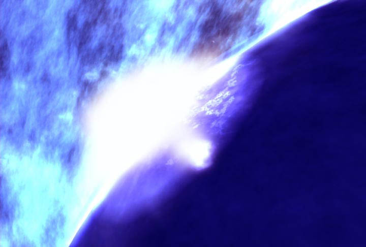 Neutronenstern mit rotem Riesen (NASA) (Original text: The neutron star EXO 0748-676 (blue sphere in the image) is part of a system, with its companion star (yellow-red sphere in the image) supplying the fuel for the thermonuclear bursts. During outbursts from the companion, or when the orbit brings the stars closer together, gas from the companion star flows toward the neutron star, attracted by its strong gravity. The flow of gas forms a swirling around the neutron star (represented by the multi-colored swirl around the blue sphere in the image).) (Credit: NASA)